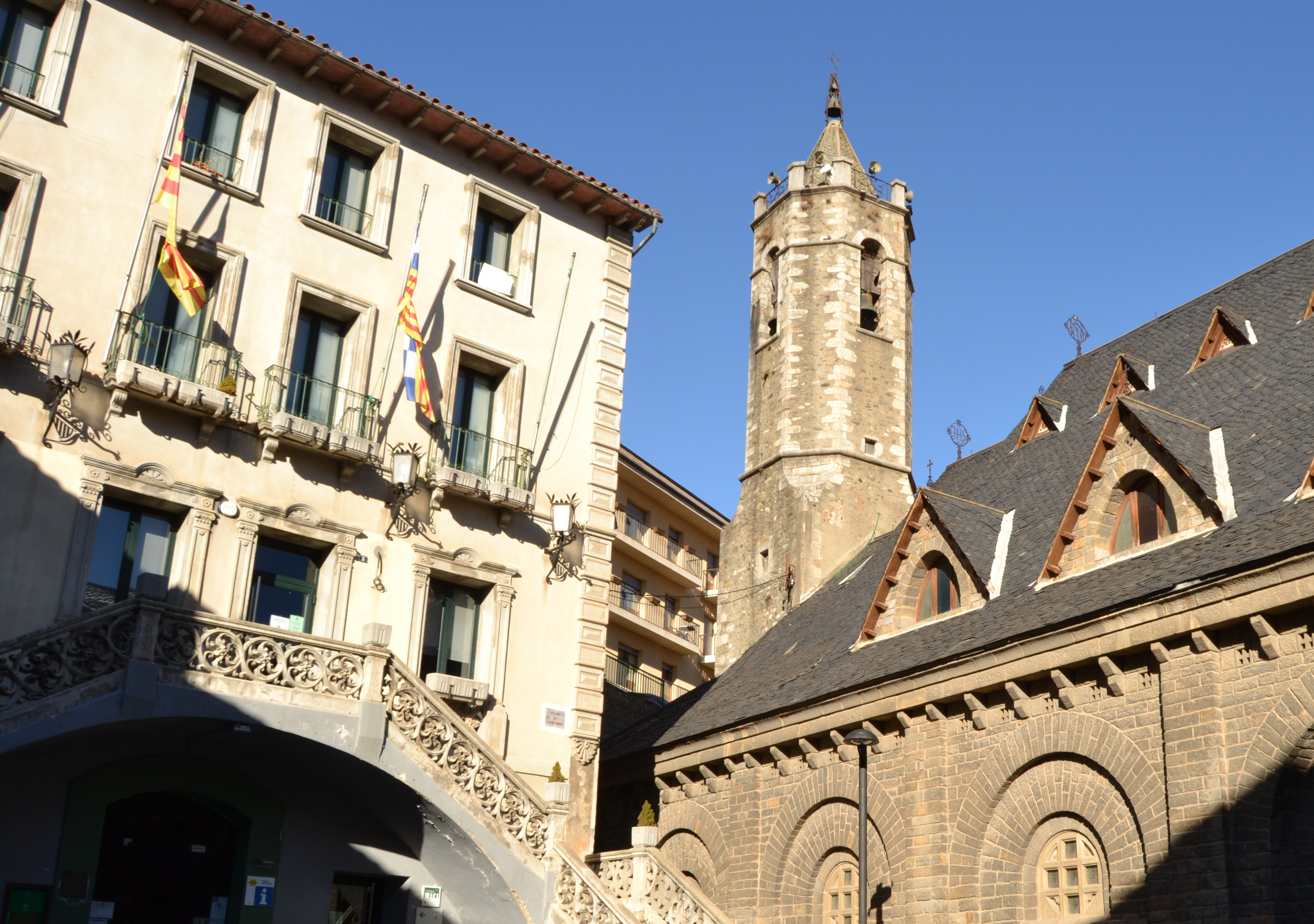 Església i ajuntament de Ribes de Freser